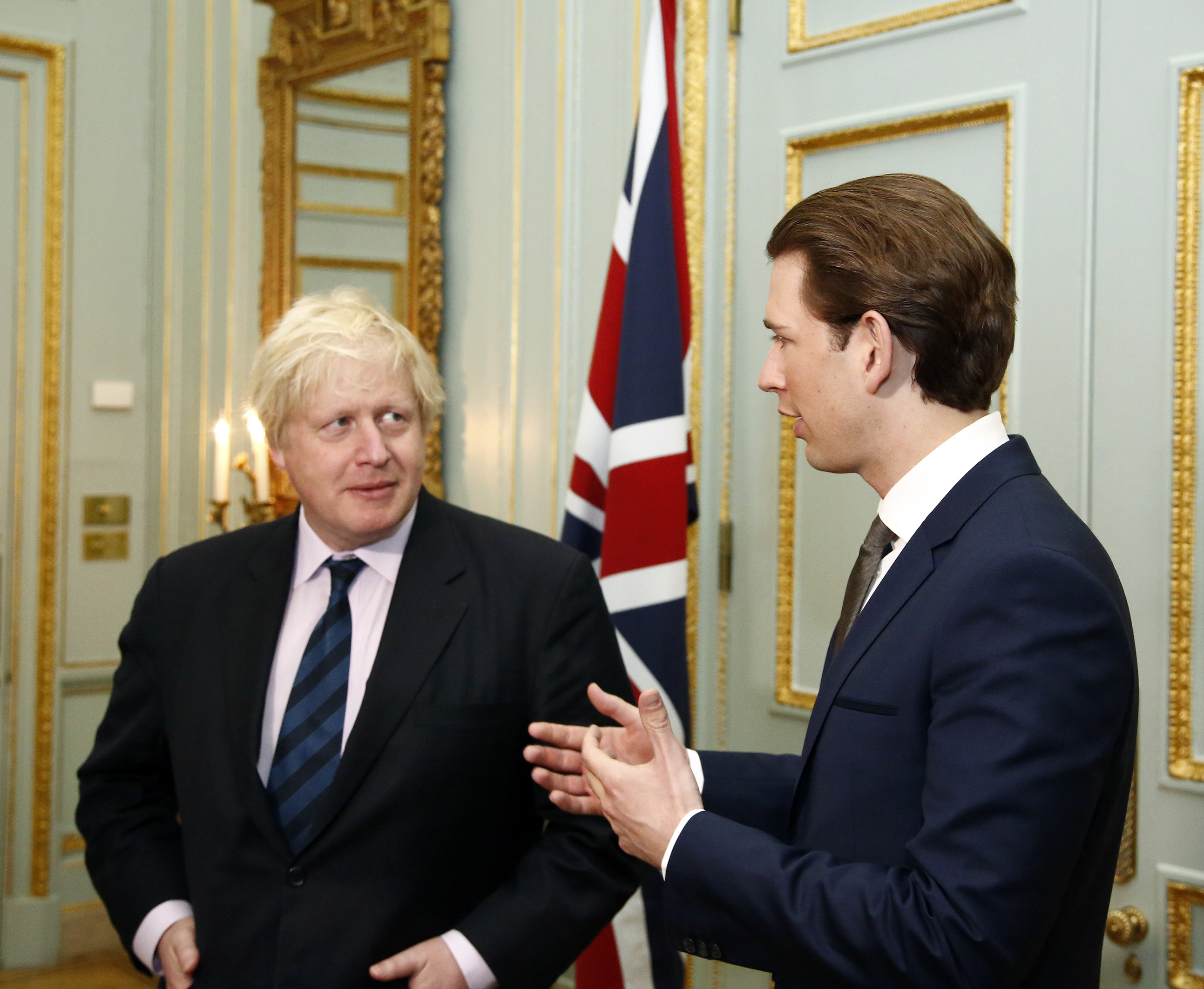 Arbeitsbesuch London. Bundesminister Sebastian Kurz trifft den britischen Außenminister Boris Johnson. London, 20.03.2017, Foto: Dragan Tatic